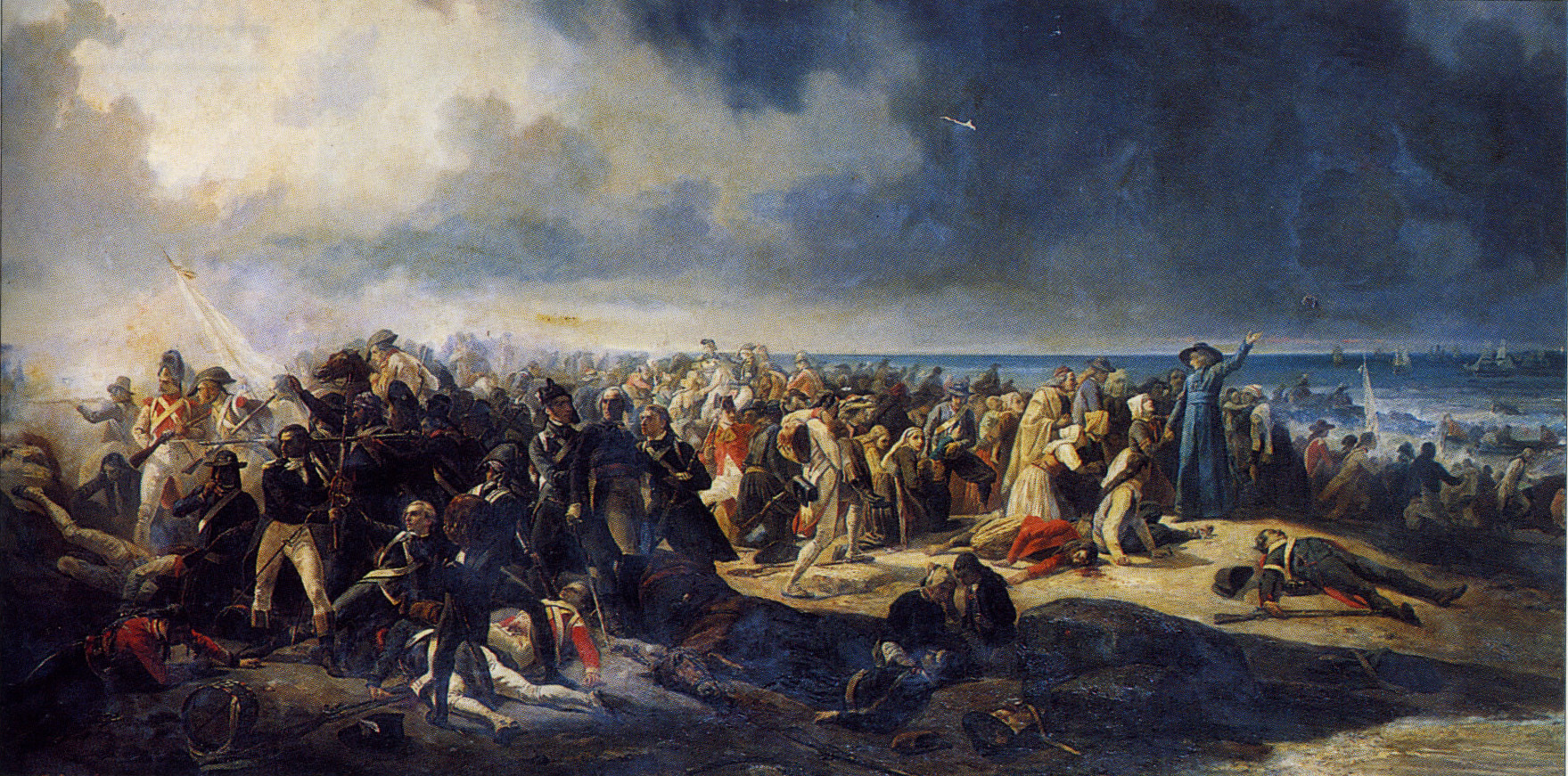 Sombreuil et une poignée de combattants royalistes (à gauche) tentent de repousser les forces républicaines et de protéger la fuite des non-combattants qui tentent de se réfugier à bord des navires anglais